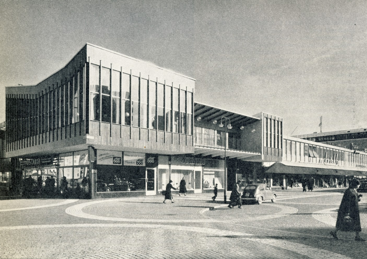 Stadsdelen Vällingby utanför Stockholm, 1955.